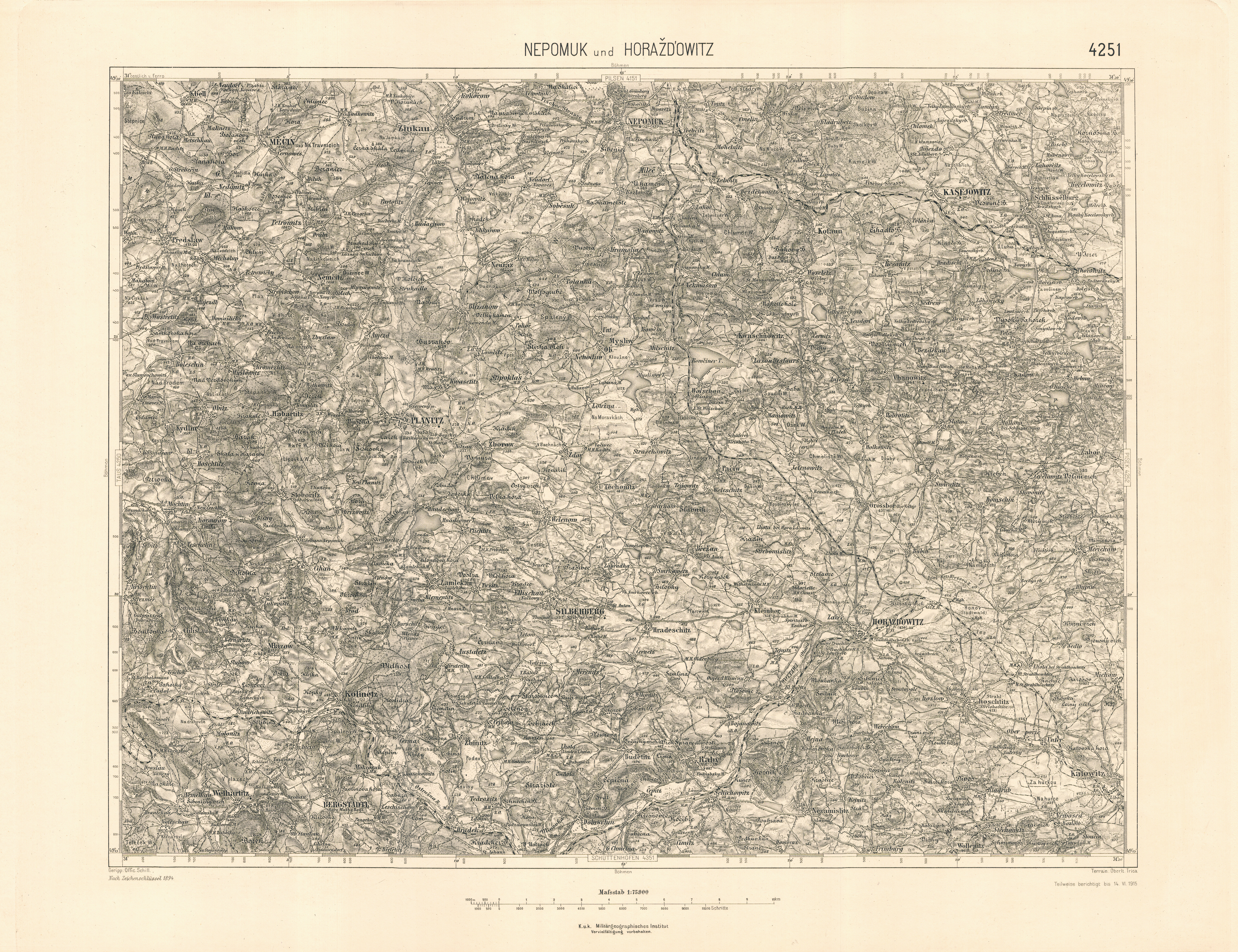 historische Landkarte: Spezialkarte 1:75.000, franzisco-josephinische (3.) Landesaufnahme der österreichisch-ungarischen Monarchie. Blatt 4251 Nepomuk und Horažďowitz. Mit Kasejowitz, Měčín, Plahitz, Silberberg, Bergstadtl. Horazdowitz, Mecin